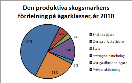 Skogstatistisk årsbok 2011